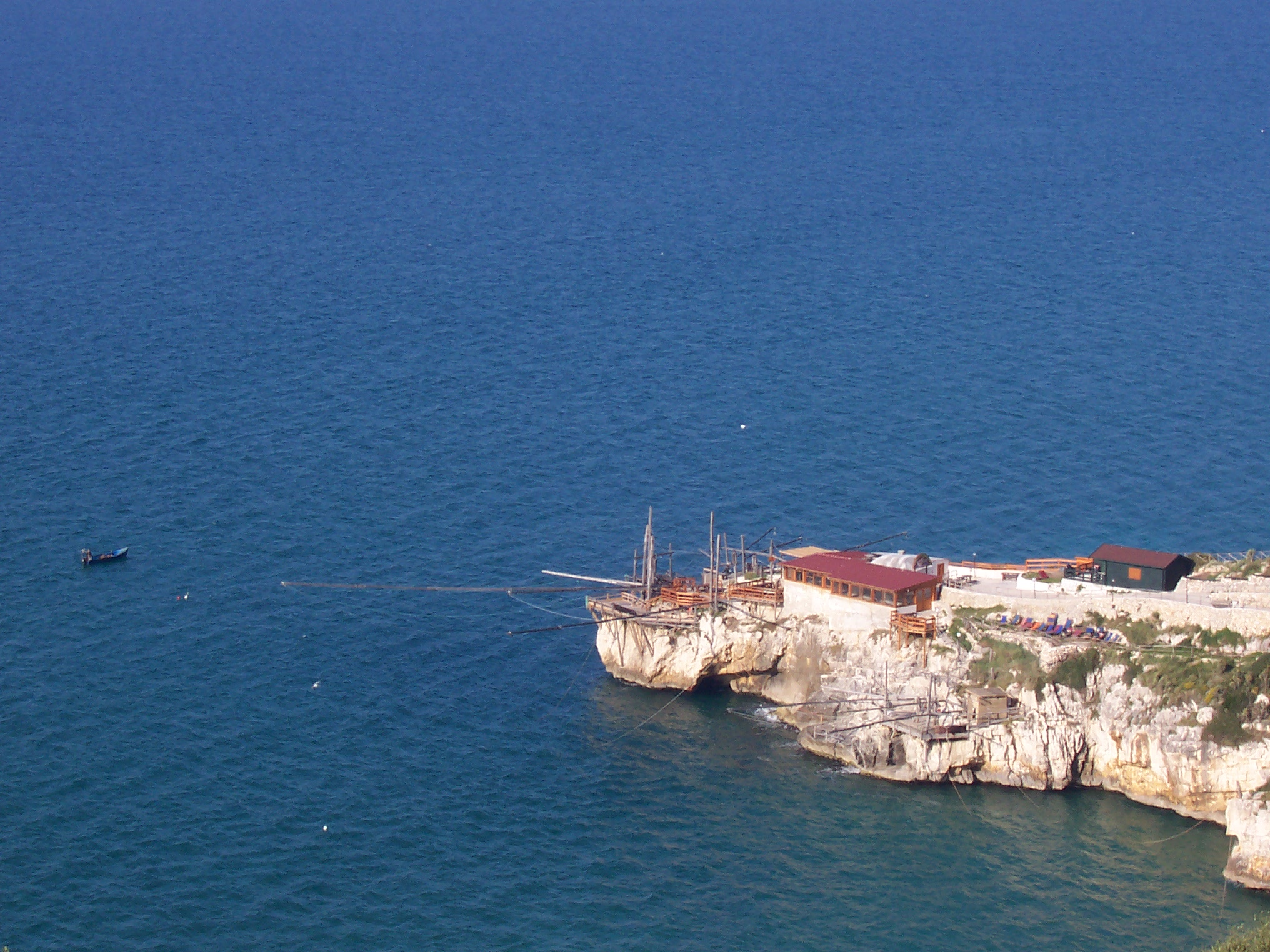 trabucco